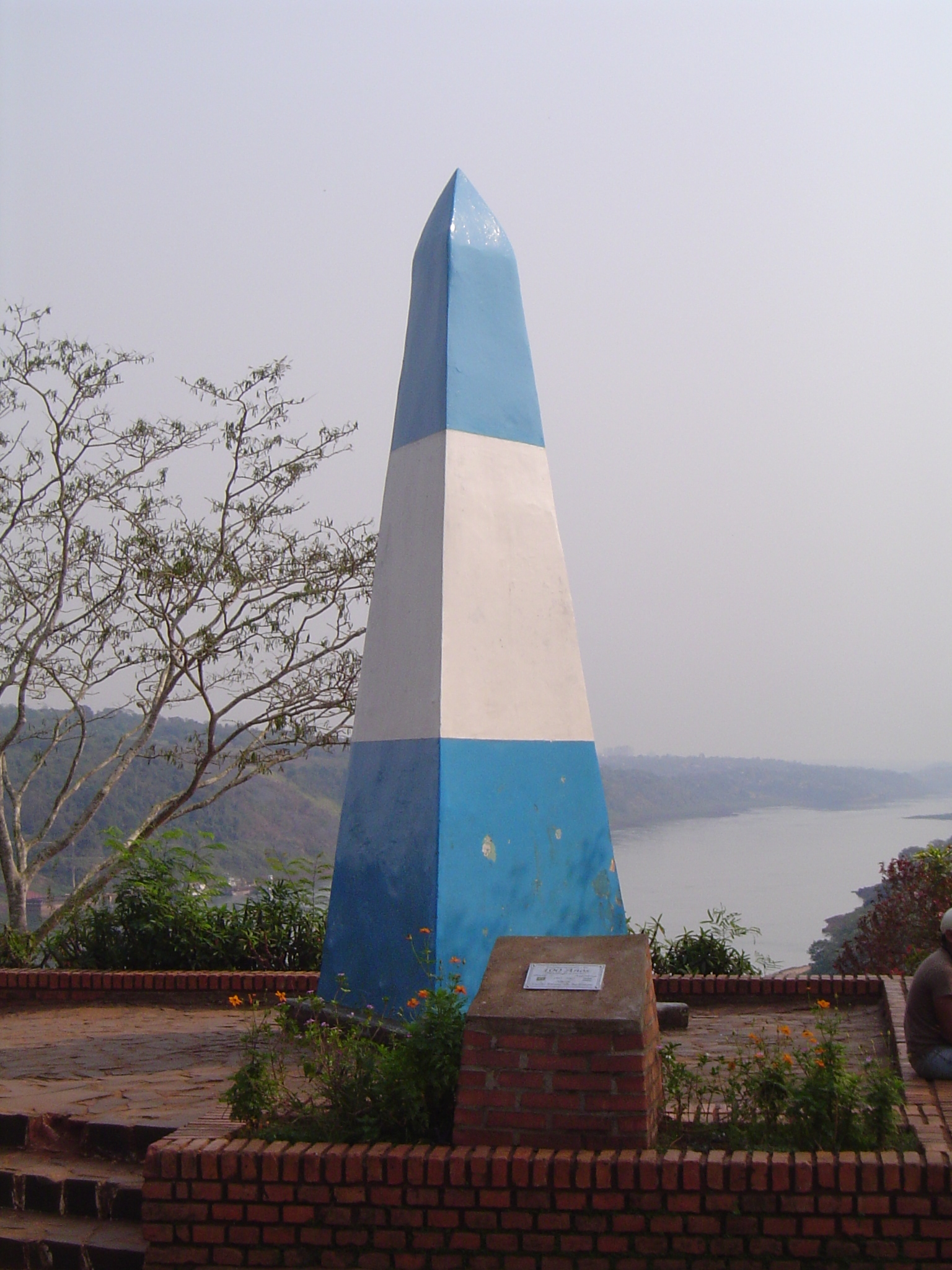 Hito de las tres fronteras: Hito Argentino.